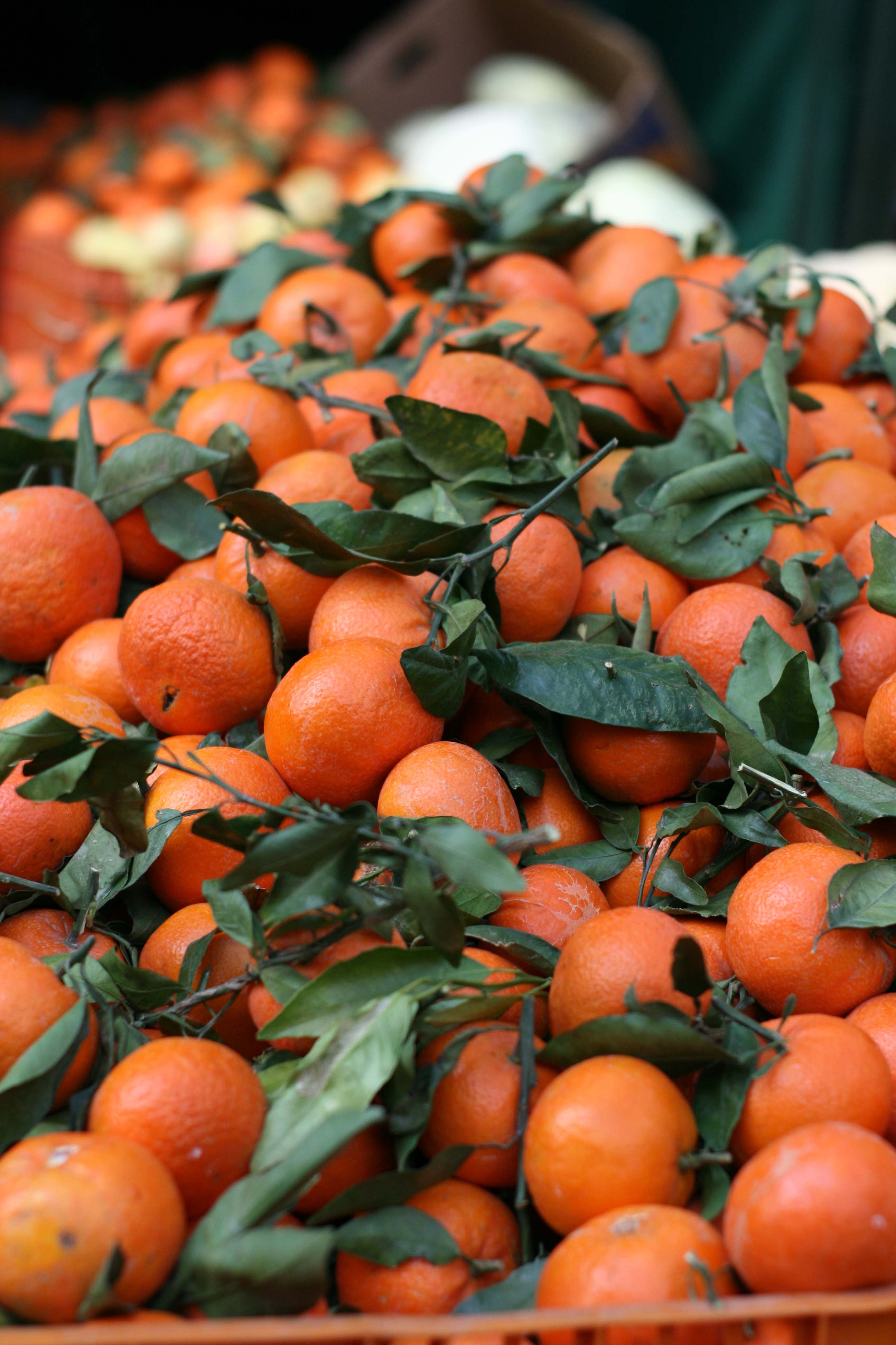 תמונה של מנדרינות בשוק נצרת